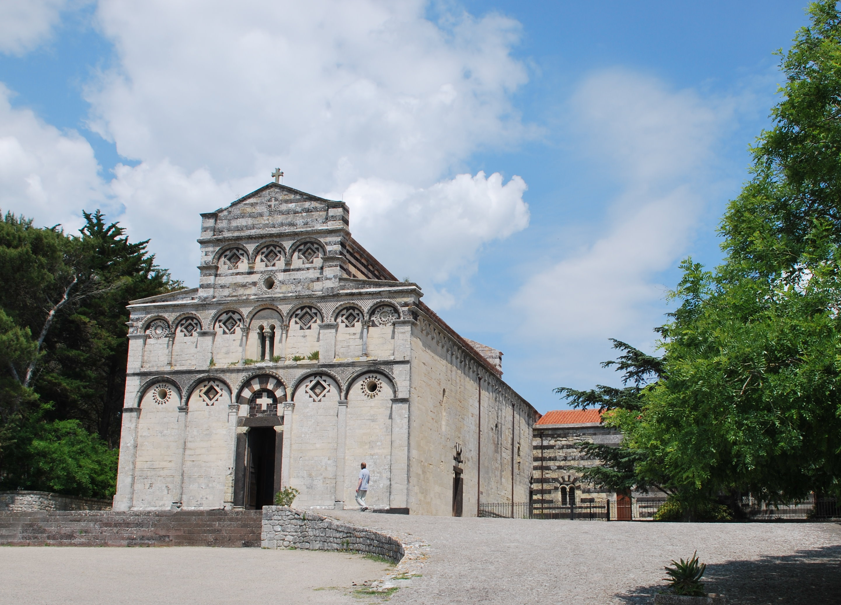 Kirche San Pietro di Sorres in Borutta, Aussenansicht